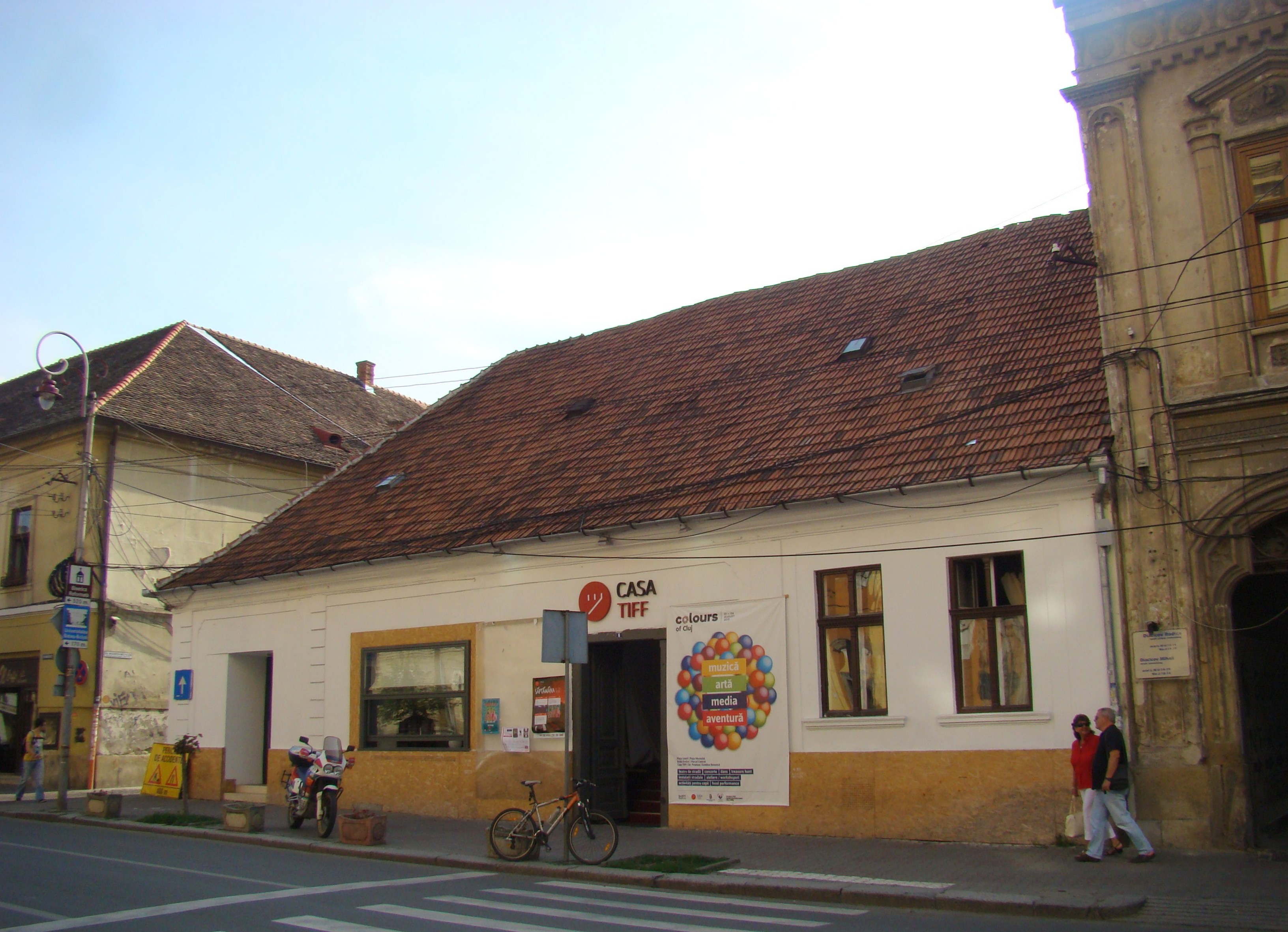 Clădire monument istoric, str.Universității 6